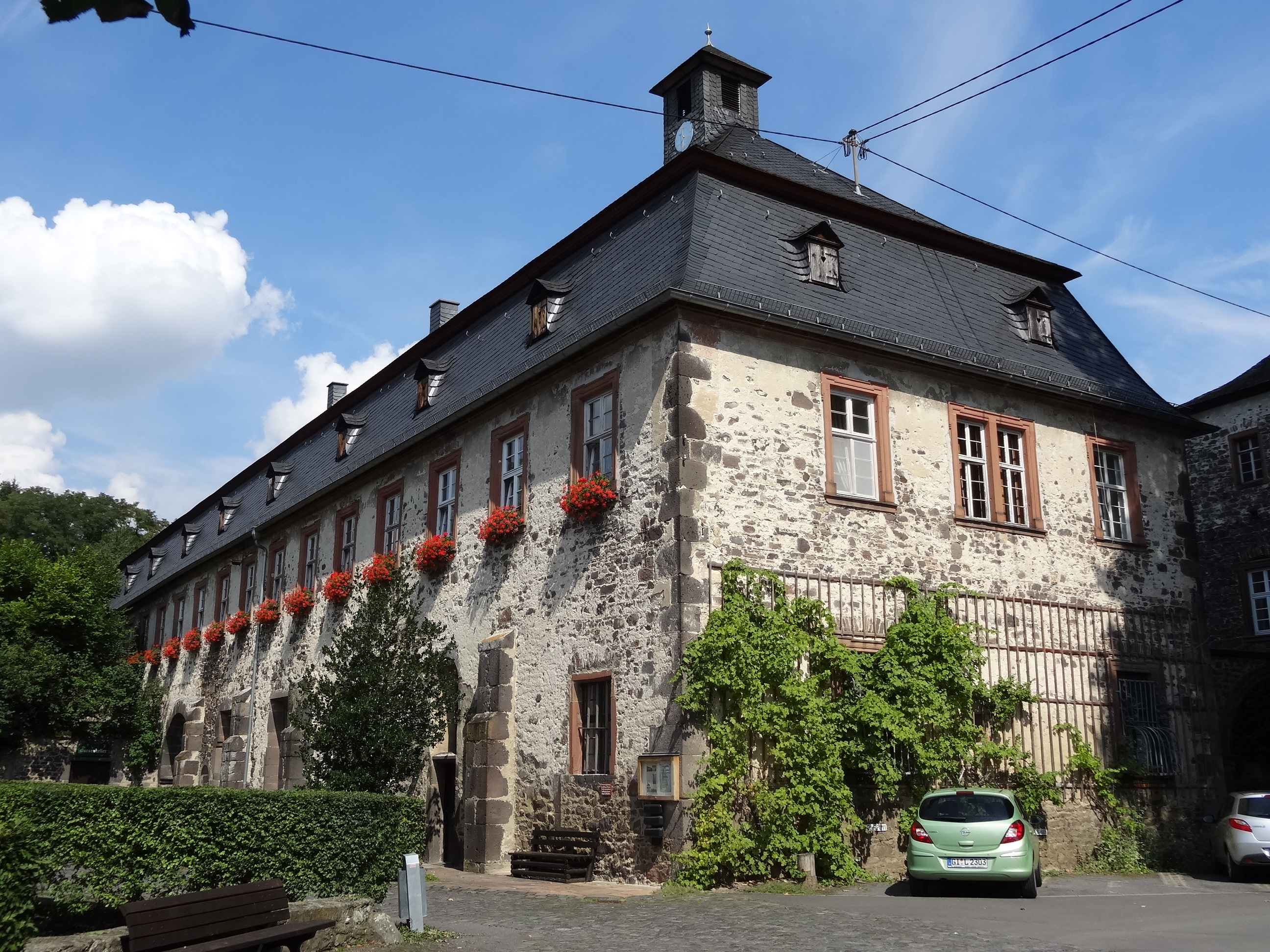 Kloster Arnsburg (Bursenbau)